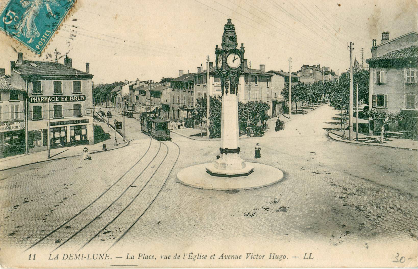 Carte postale ancienne éditée par LL, n°11 :LA DEMI-LUNE - La Place, la Rue de l'Église et Avenue Victor-Hugo.Vue de la station de tramway OTL "Demi-Lune" (ligne 5) formant un évitement sur la voie unique.